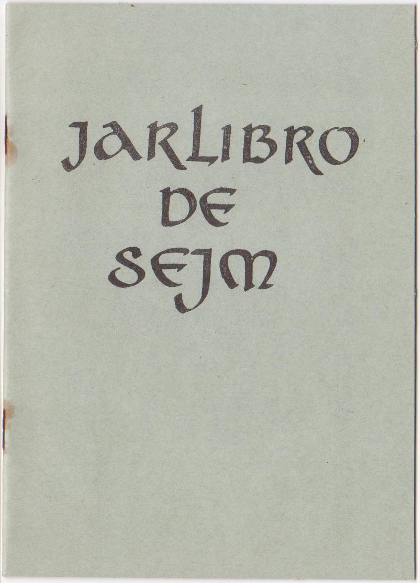 La kovrilpagxo de Jarlibro de SEJM.